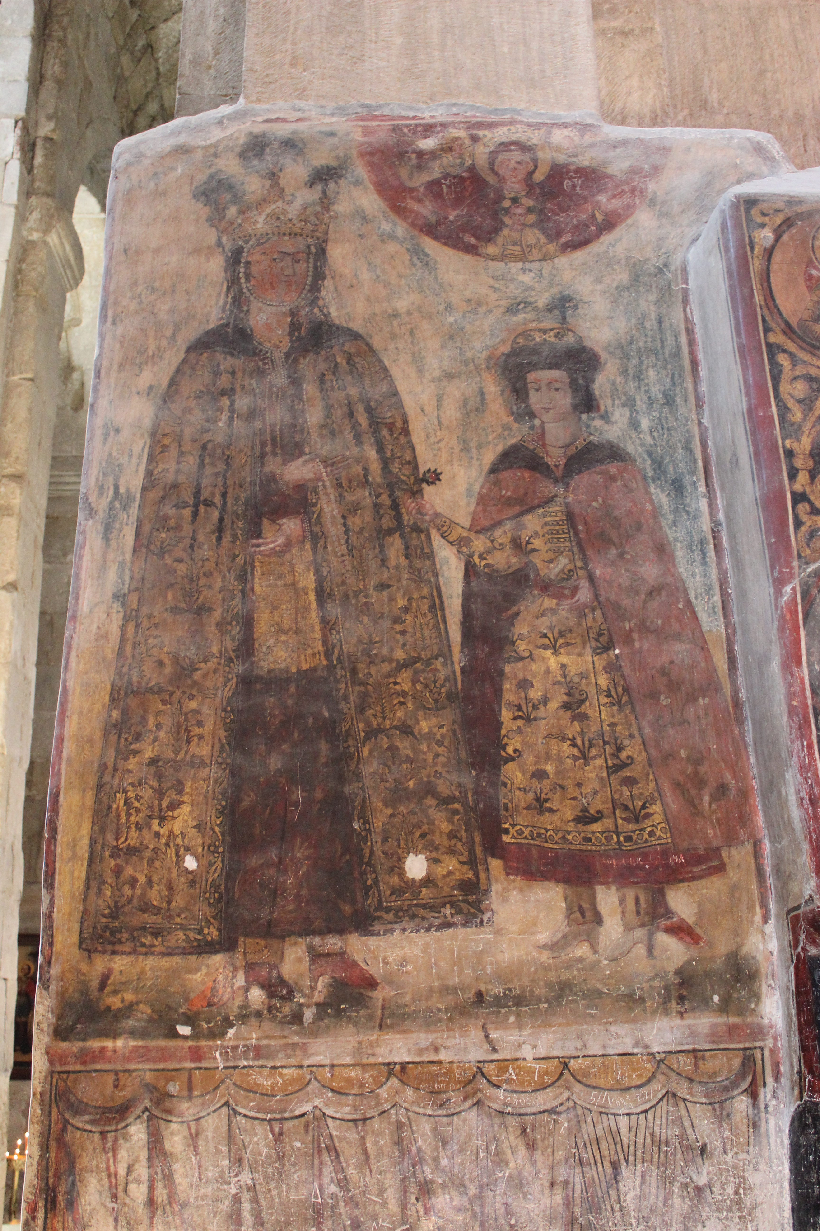 Mtskheta - Svetiskhoveli Cathedral